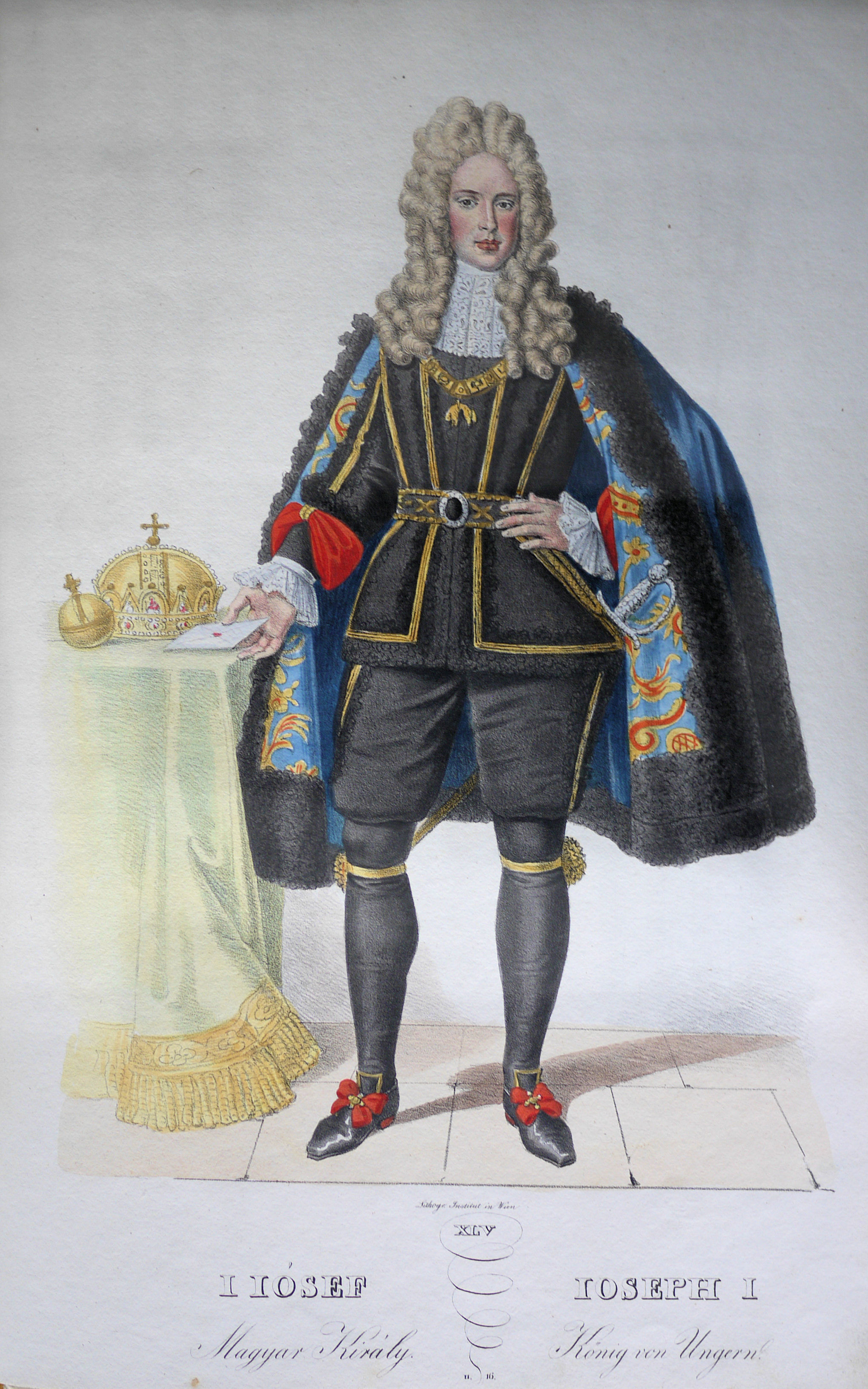 Joseph I. (1678-1711), römisch-deutscher Kaiser, König von Ungarn, Böhmen etc. Lithographie von Josef Kriehuber nach einer Zeichnung von Moritz von Schwind aus Ungerns Erste Heerführer Herzoge und Koenige In einer Reihe von Bildnissen von Bela bis auf Seine Majestät Franz I. Kaiser Von Österreich König Von Ungern &c., &c. Wien : Lithographisches Institut ;ca. 1828